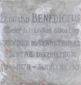 Cases du columbarium du cimetière du Père-Lachaise.